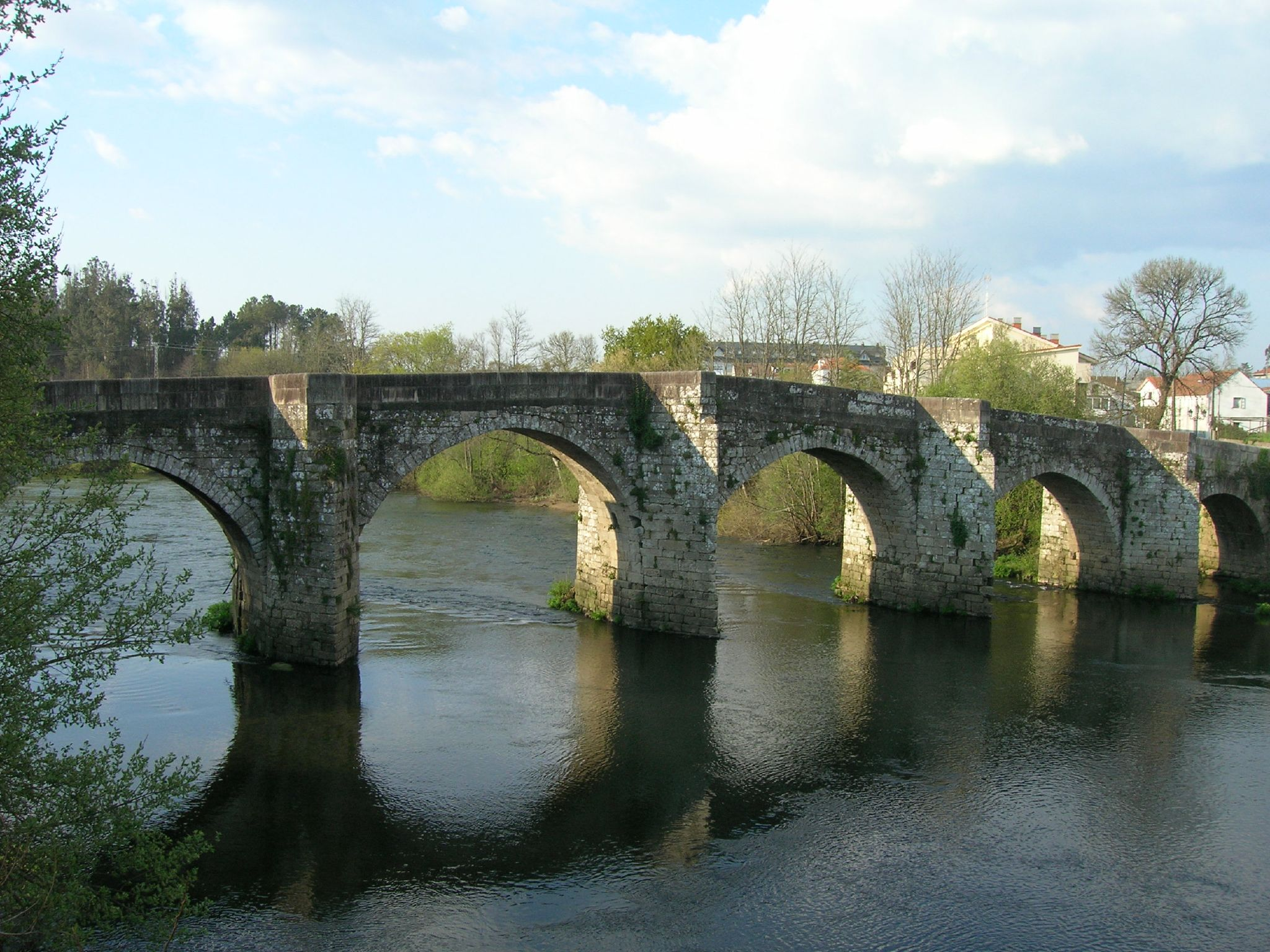 Ponte medieval de Pontevea, Teo